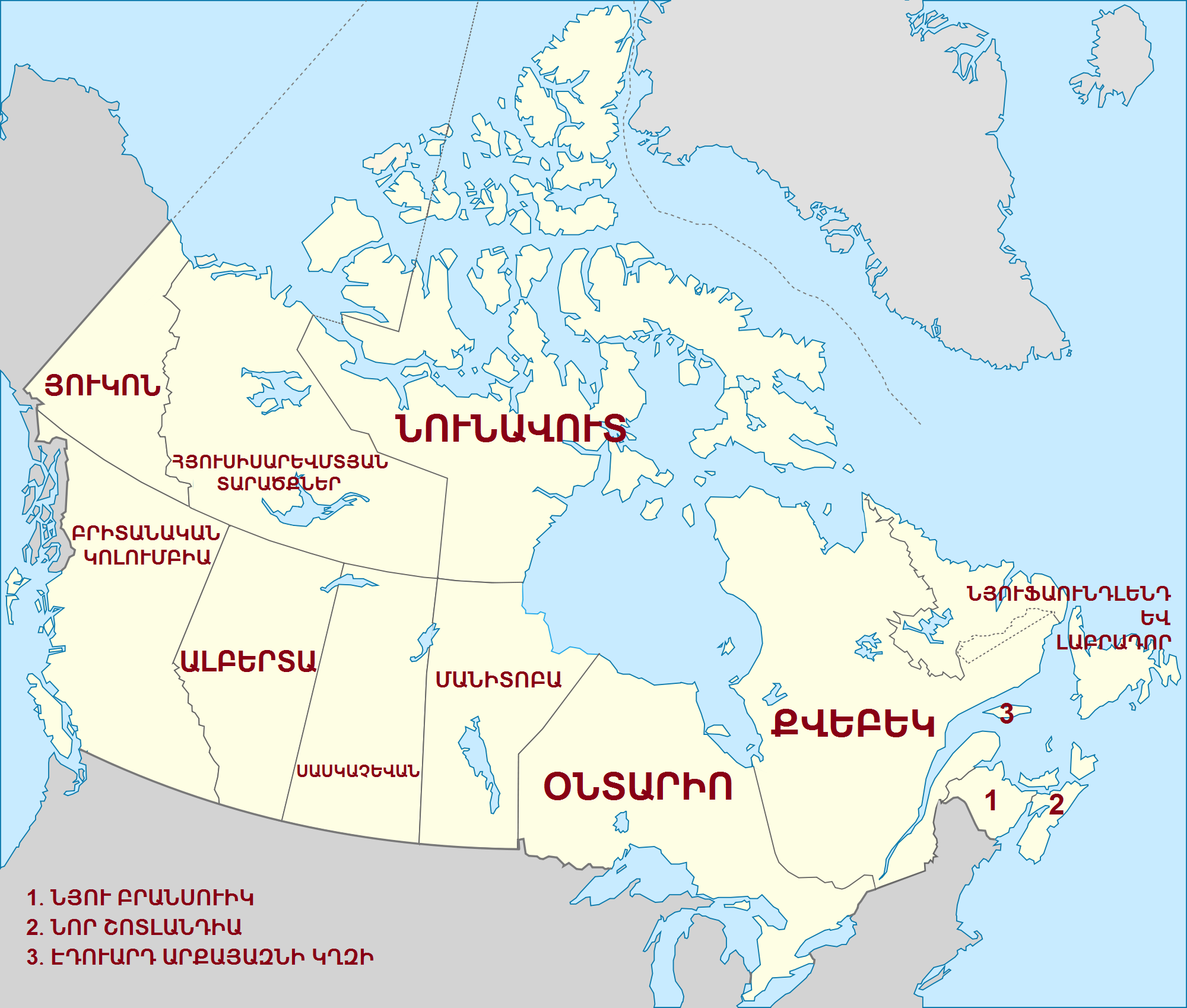 Կանադայի պրովինցիաները և տարածքները